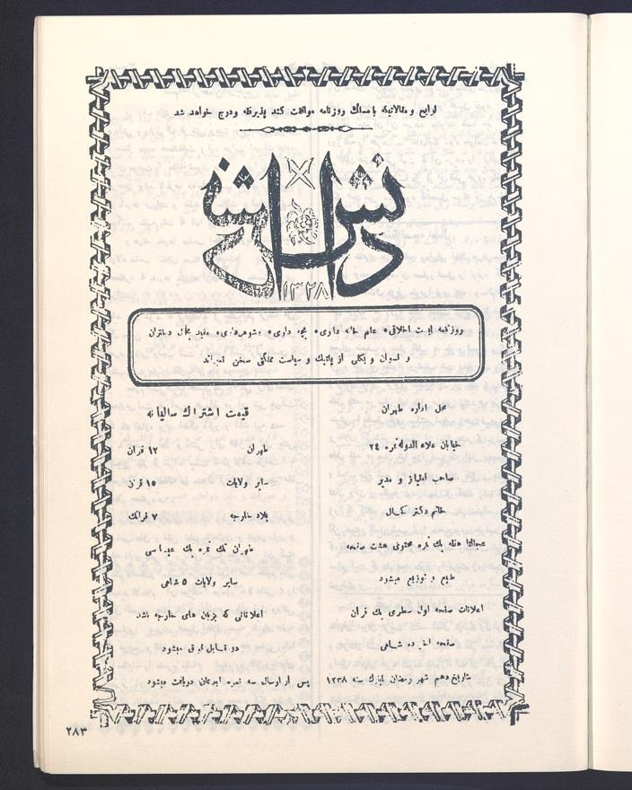 1. Ausgabe